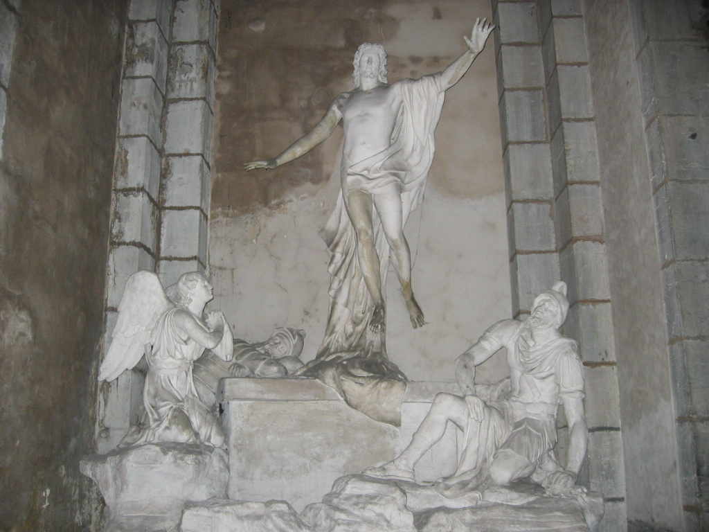 à l'Église de la Madeleine de Besançon en Franche Comté - France